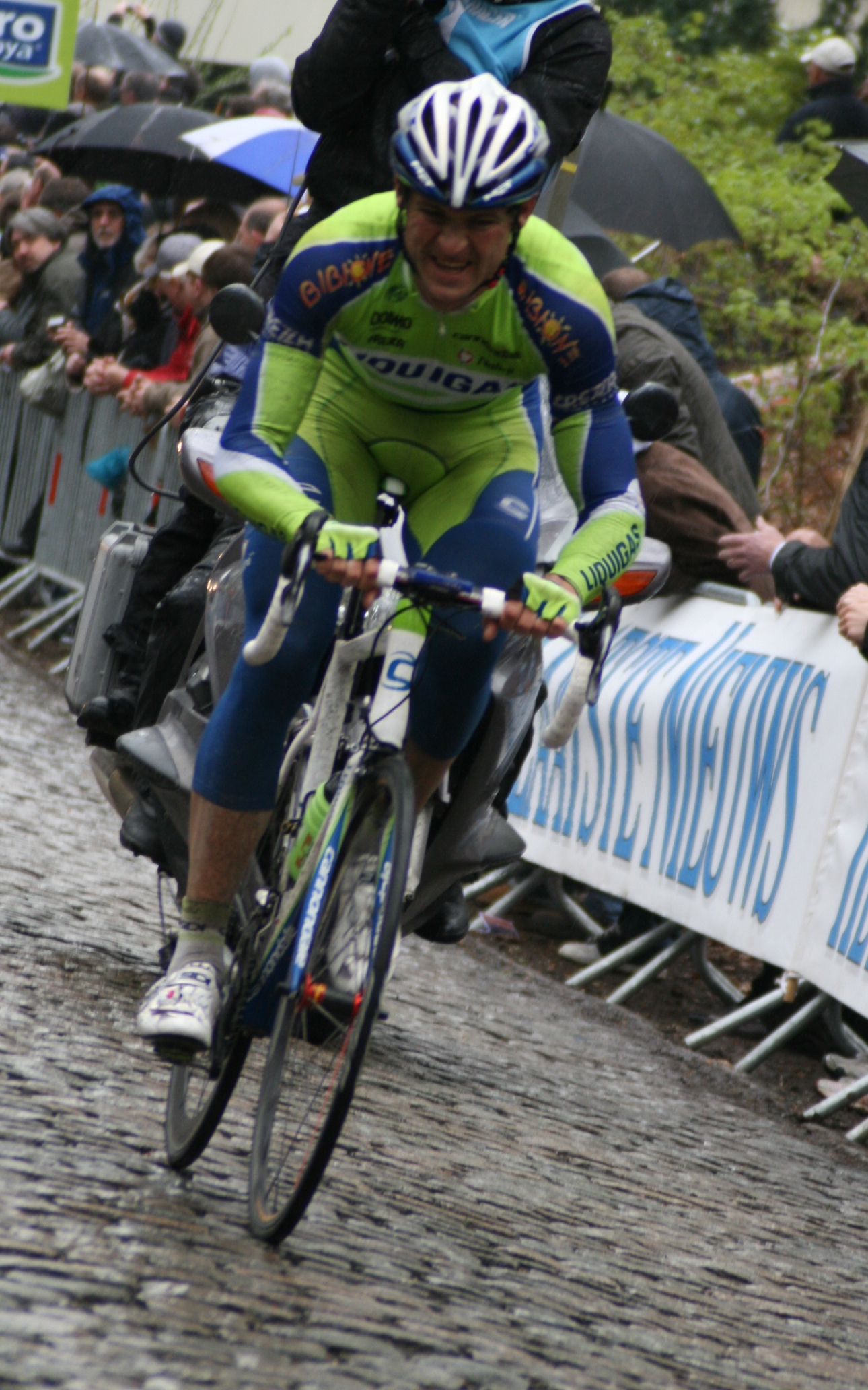 Gent-Wevelgem 2009 : Aliaksandr_Kuchynski au mont Kemmel